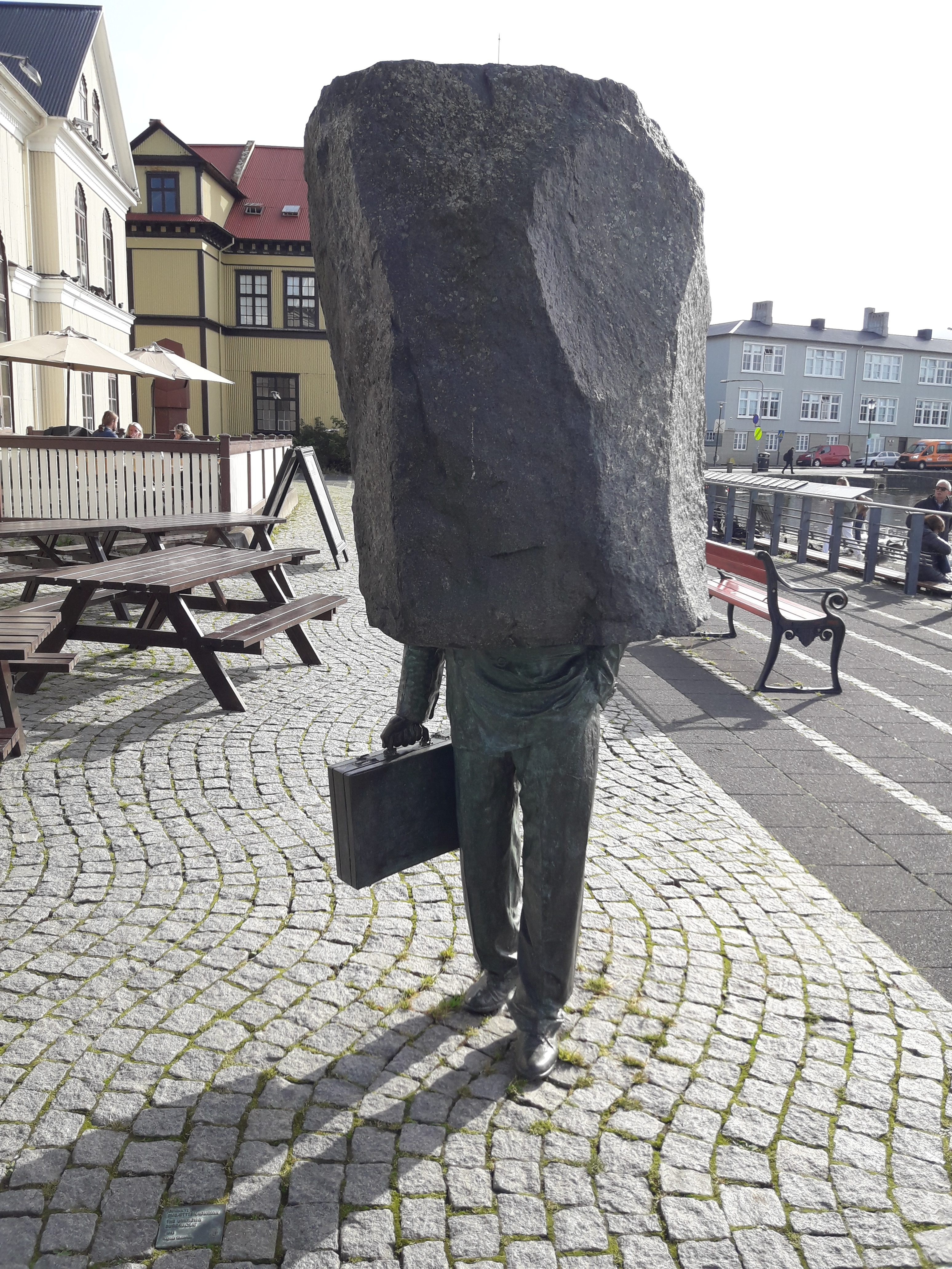 Monument al treball a la ciutat de Reykjavik